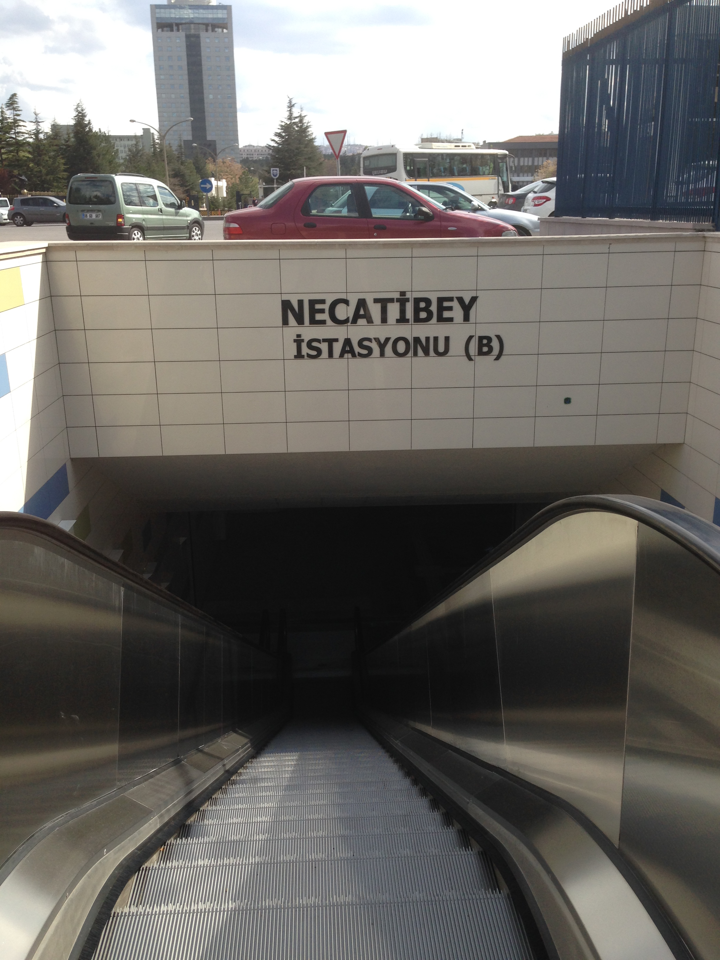 Çayyolu Metrosu